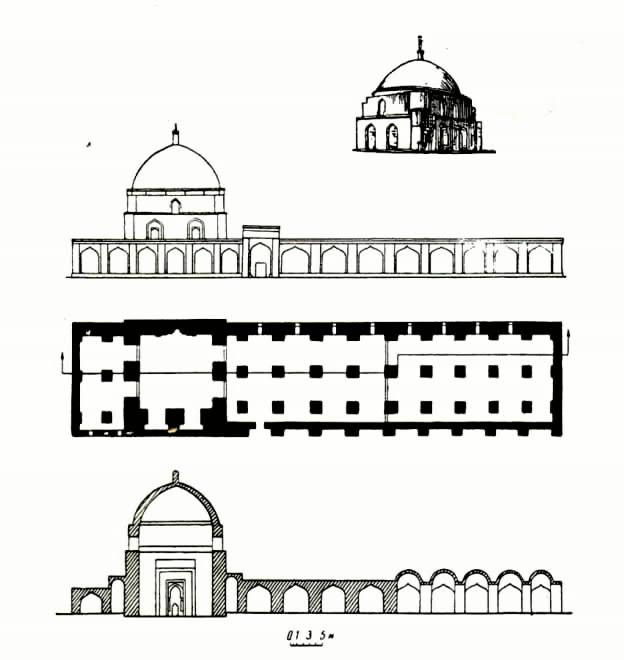 Urmiya Cümə məscidinin planı və kəsiyi